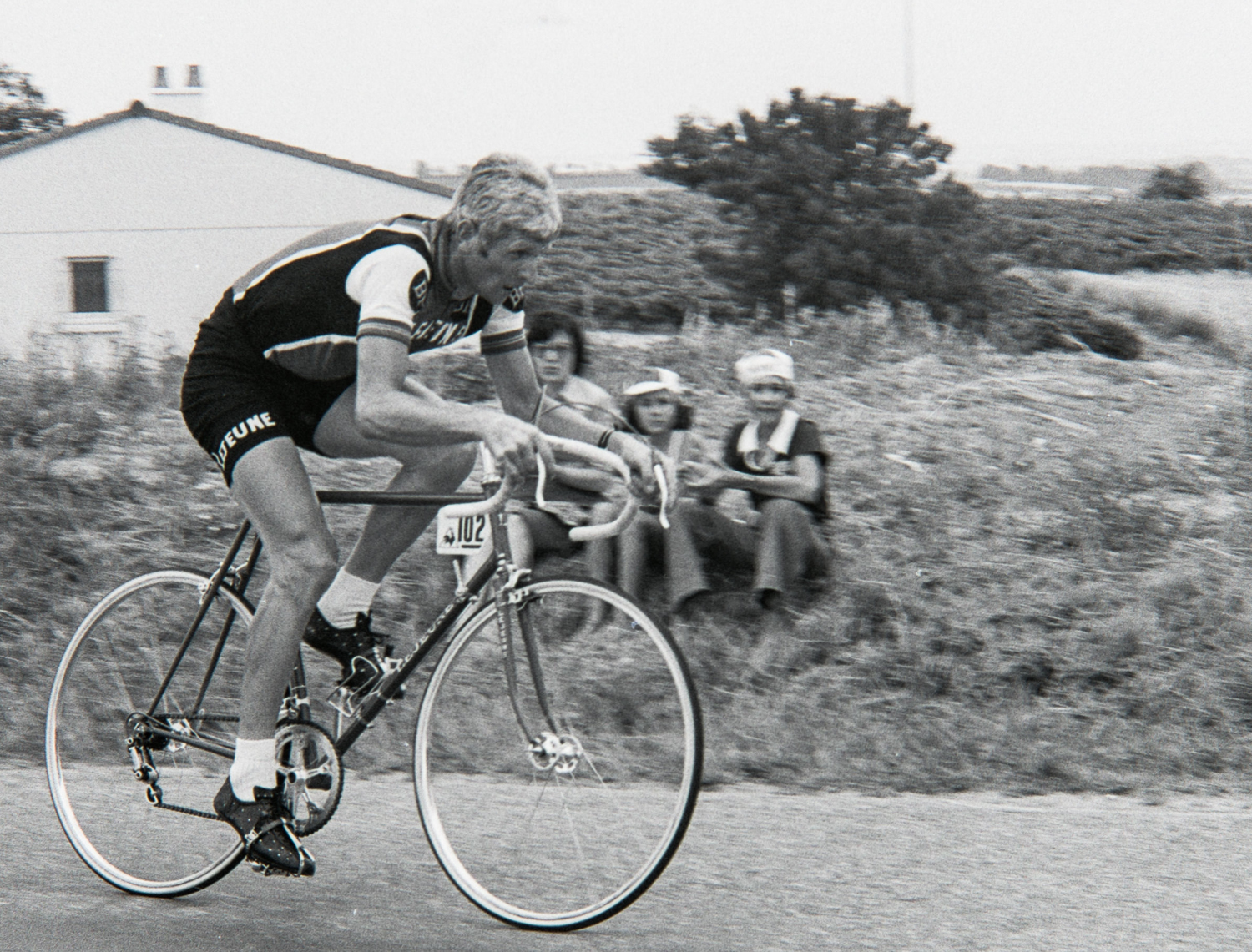 Ferdinand Bracke durant le Tour de France 1976. Photographie : René Milanese